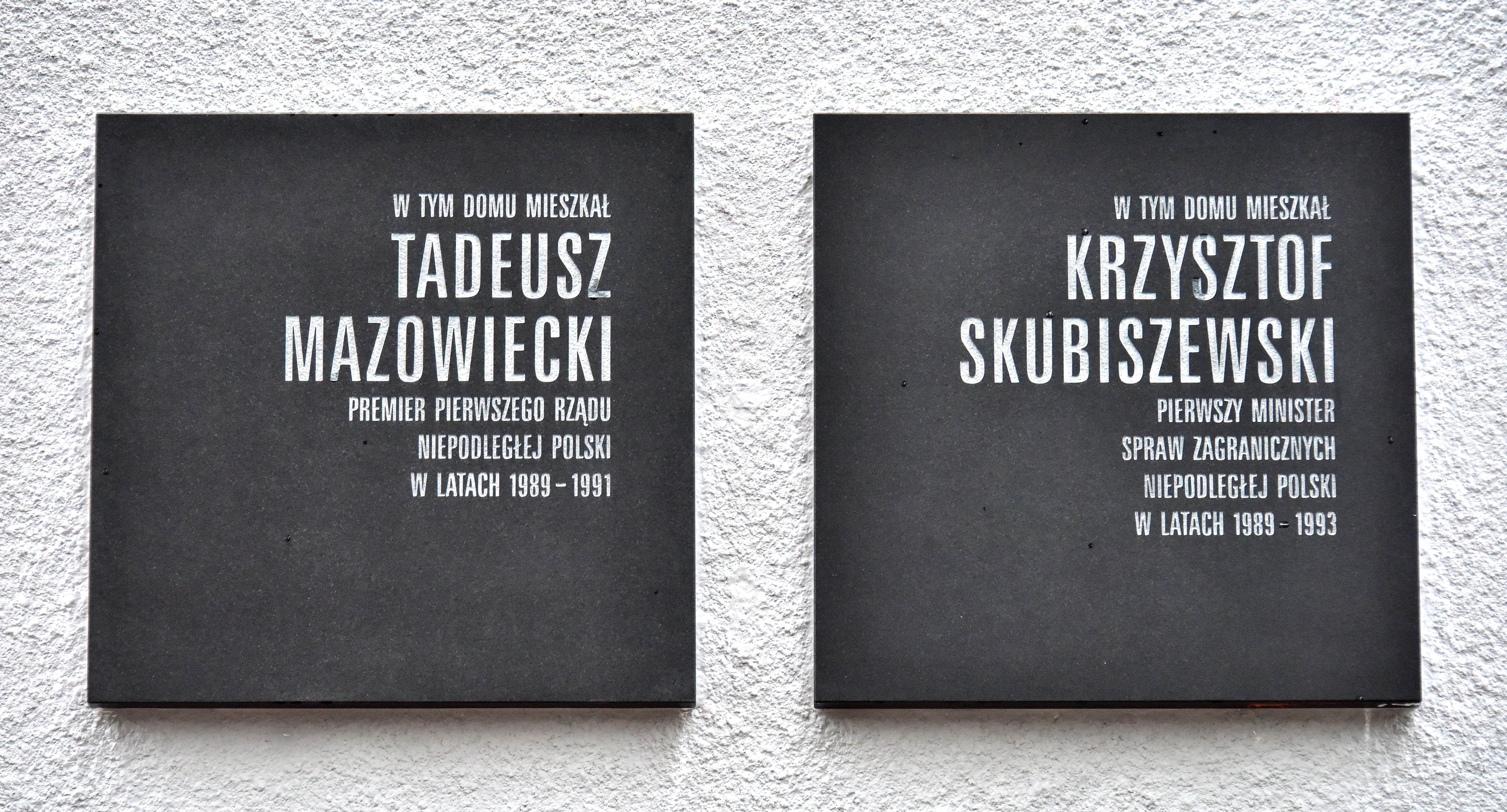 Tablice upamiętniające Tadeusza Mazowieckiego i Krzysztofa Skubiszewskiego na domu przy ul. Lewickiej 13/15 w Warszawie (obydwaj mieszkali w tym samym budynku)